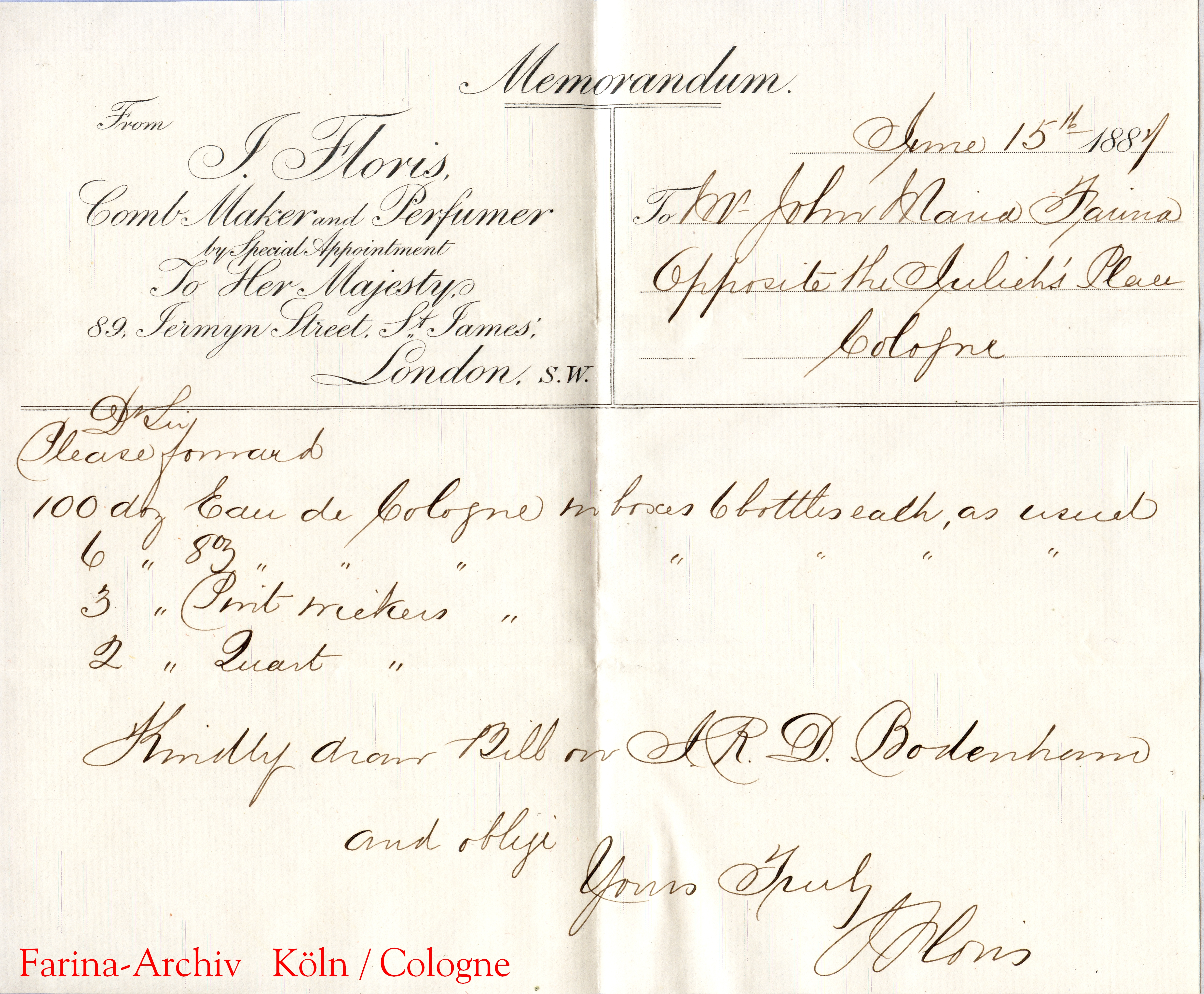 Letter from Floris to Johann Maria Farina gegenüber dem Jülichs-Platz, Cologne, 1887